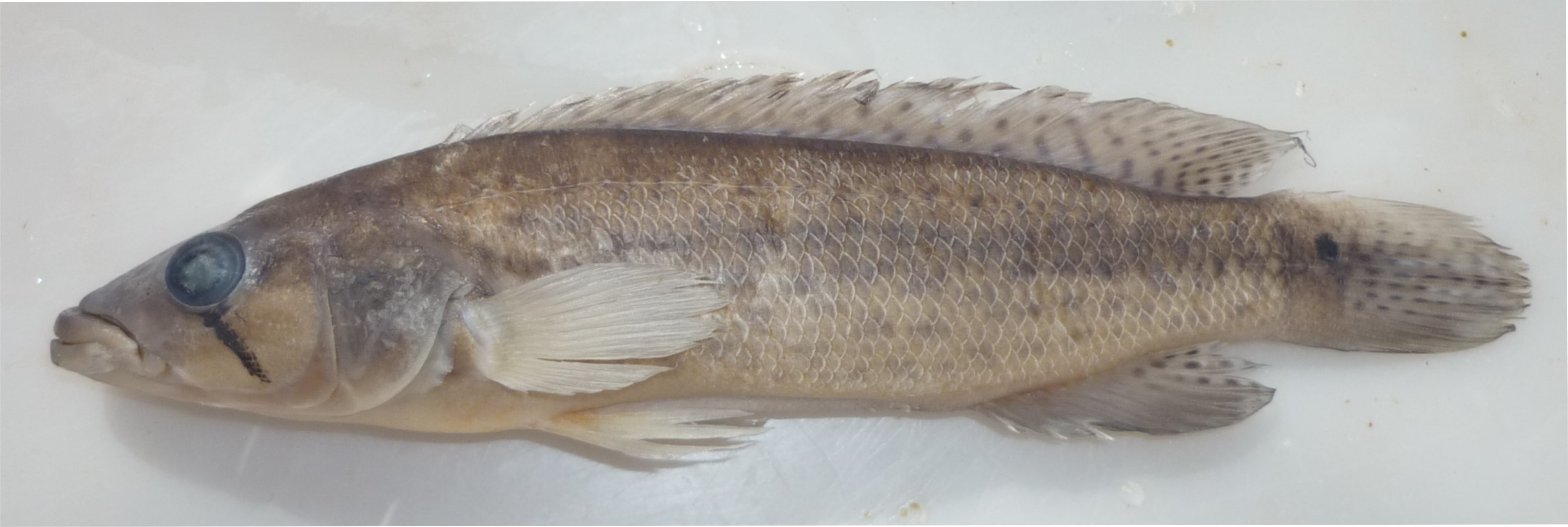 Ejemplar preservado (formolizado)